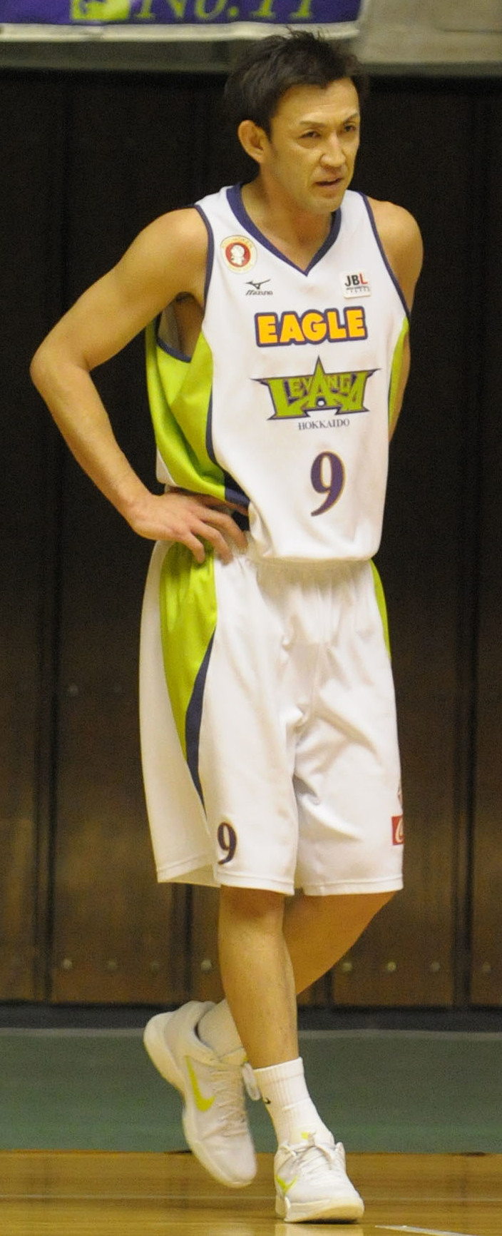 レバンガ北海道、折茂武彦選手。秋田県立体育館で。